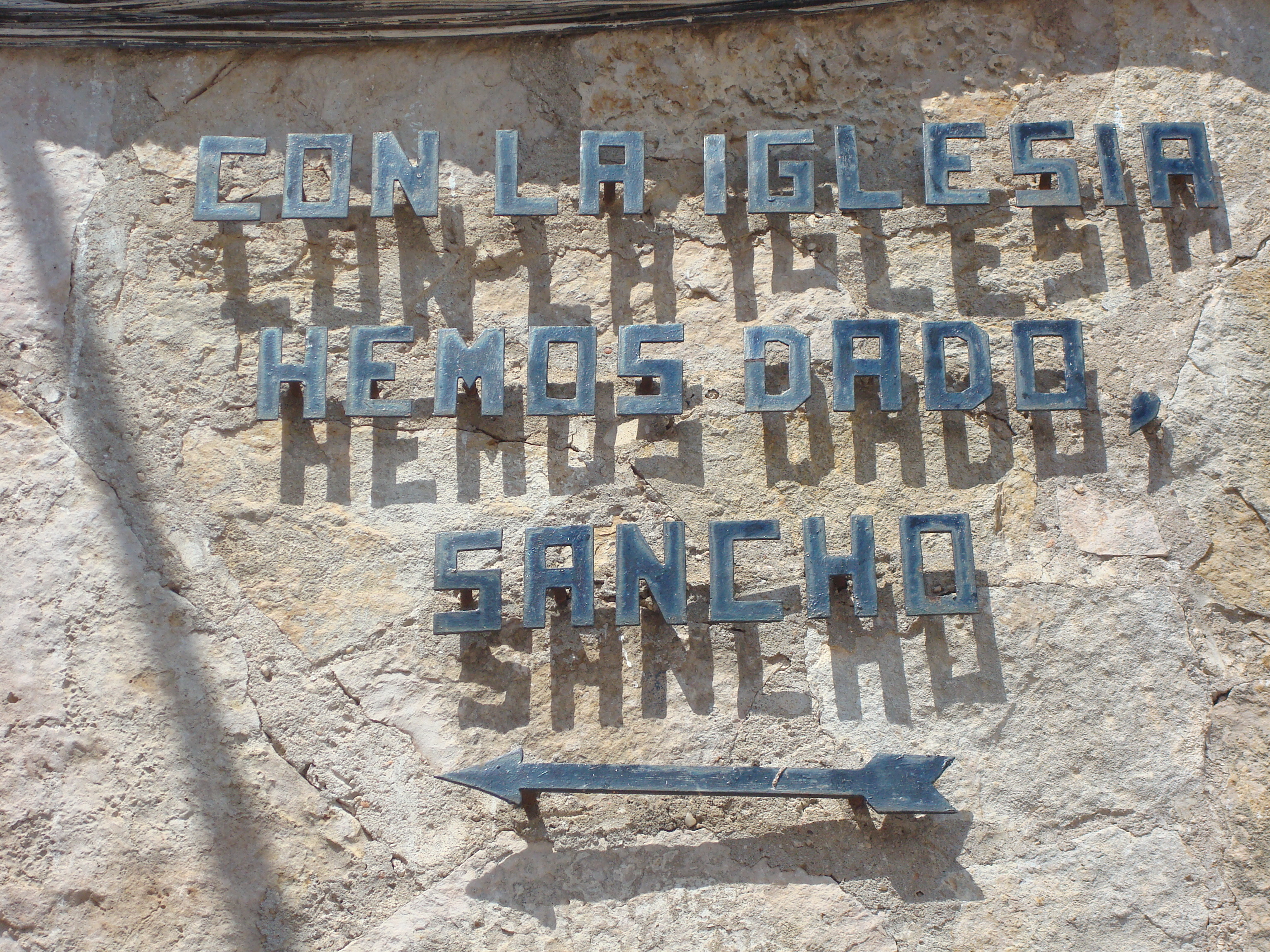 El Toboso - 003